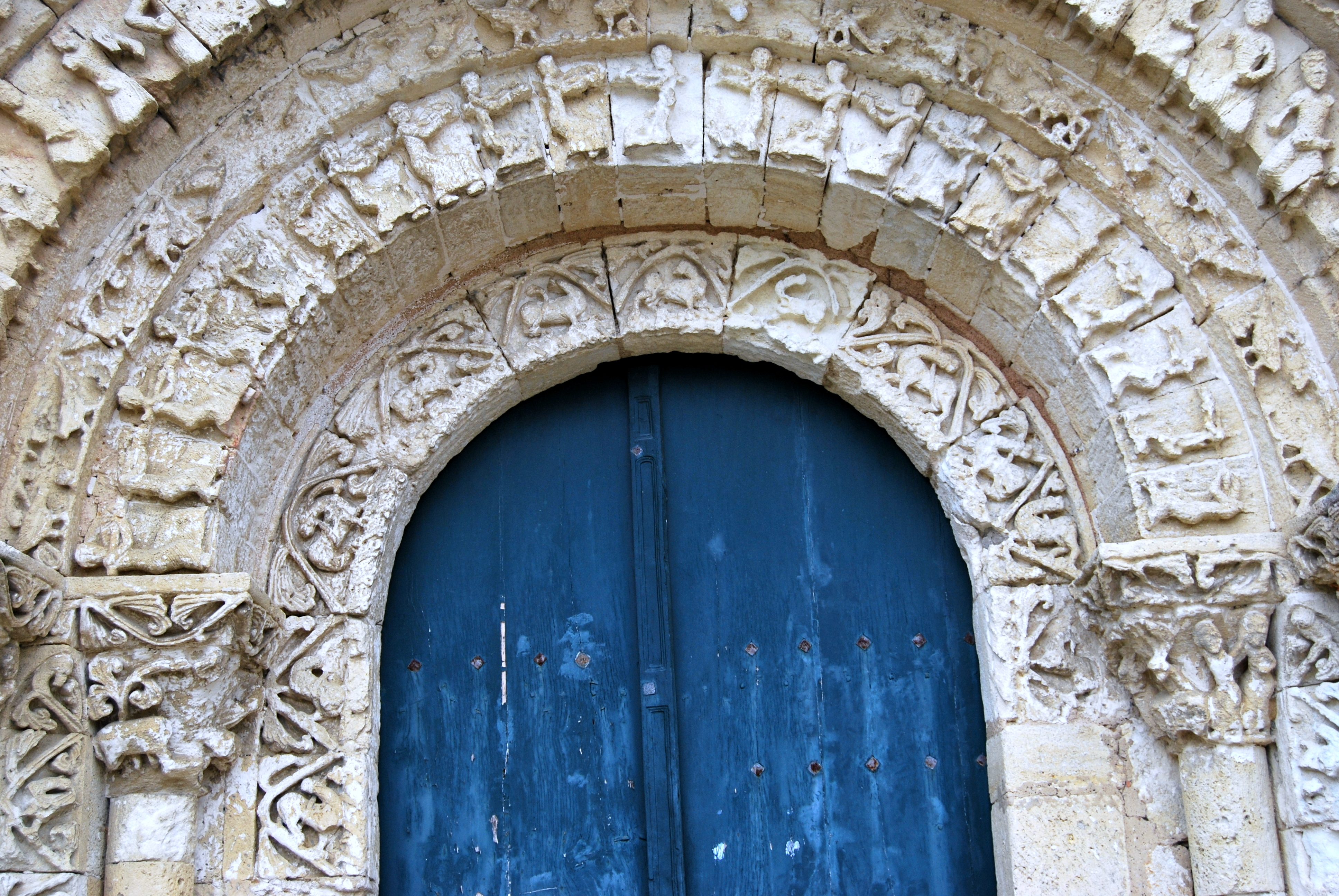 Haux église St Martin